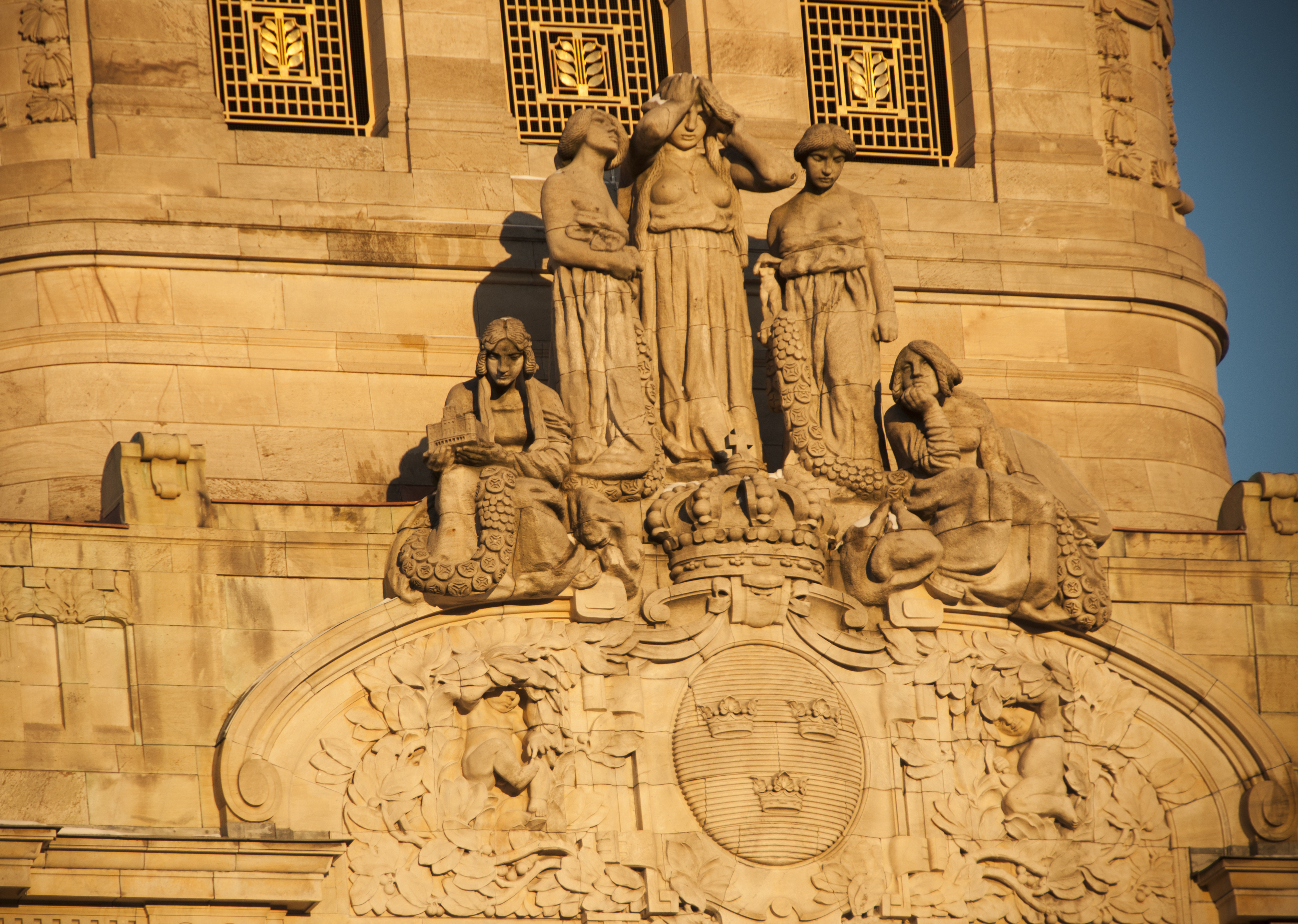 Kungliga Dramatiska Teatern, Skådespelarkonstens musa: Arkitekturen, Poesin, Dramatiken, Skulpturen och Målarkonsten.